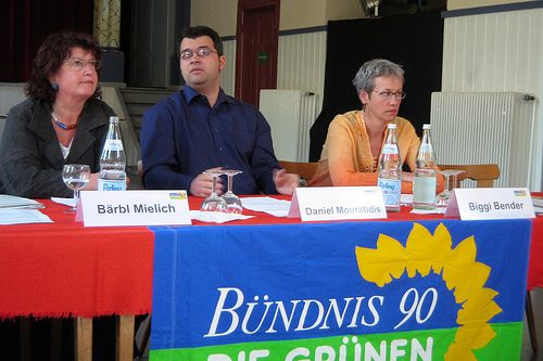 vlnr Bärbl Mielich, Daniel Mouratidis, Biggi Bender See here (in German)